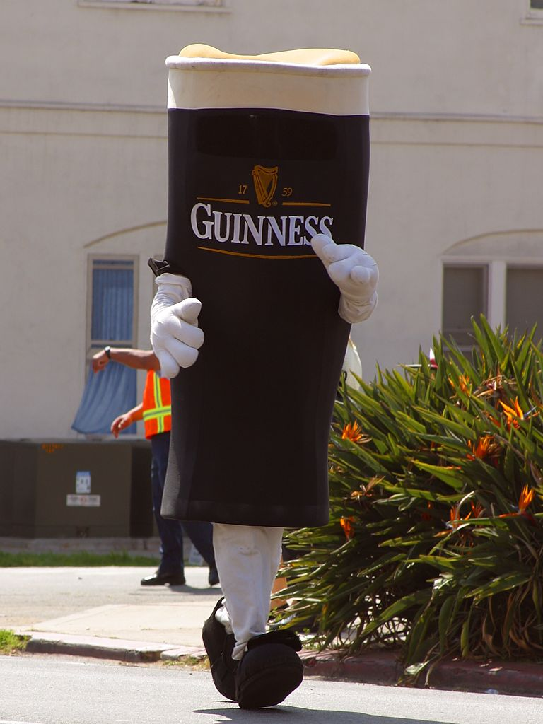 Guinness Hombre Disfraz